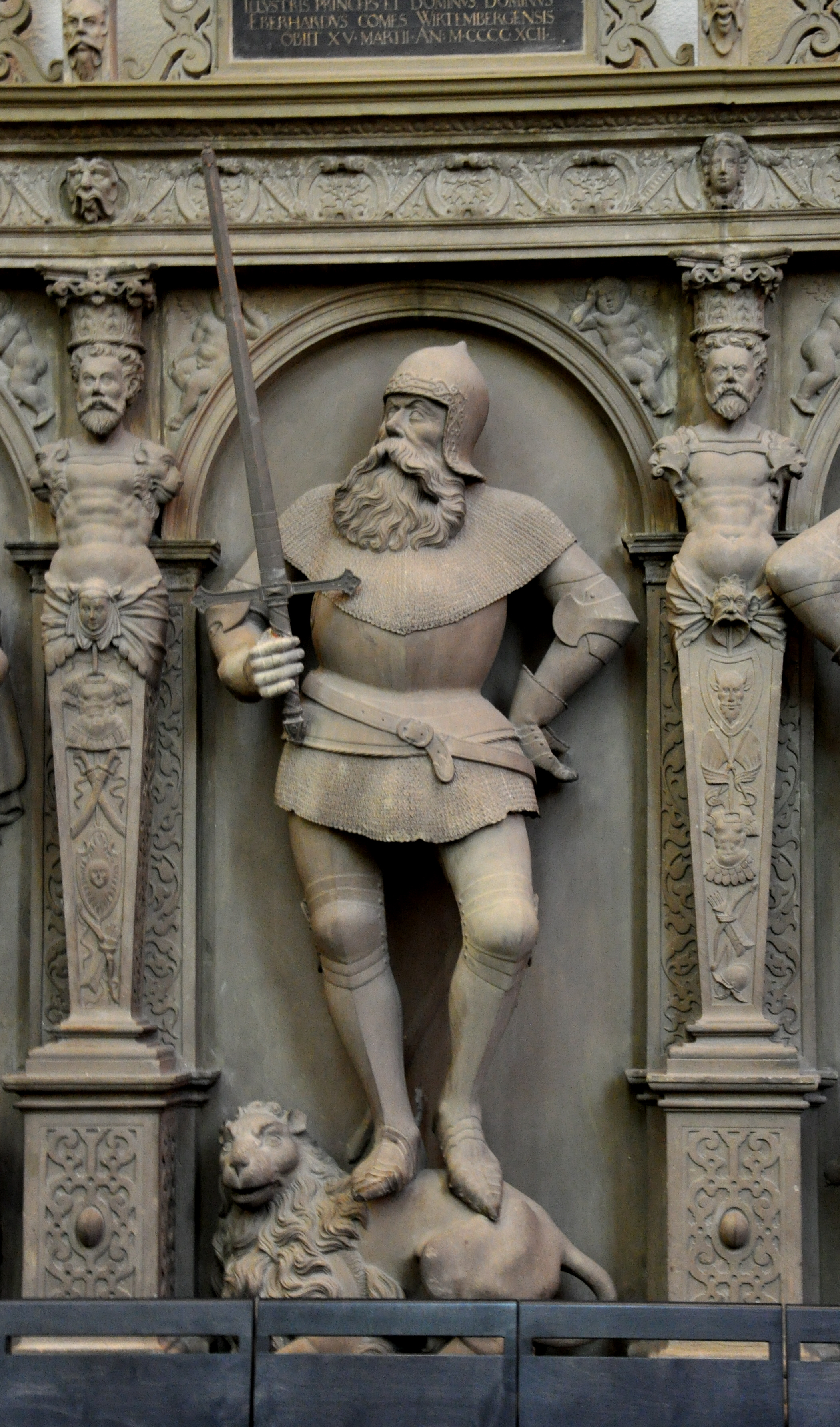 Stuttgart, Chor der Stiftskirche, Grafenstandbilder von Sem Schlör (ab 1576 entstanden zum Ersatz der ursprünglichen Epitaphe der in der Stiftskirche beigesetzten Grafen von Württemberg) Figur 6: Eberhard der Greiner († 1392)